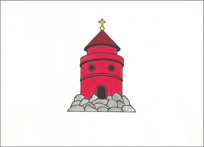 Bílý list, uprostřed volná šedá skála s červenou okrouhlou věží s ochozem a kuželovou střechou zakončenou žlutou makovicí s křížkem. Věž má obloukový vchod a dvě kruhové střílny v patře, vše černé. Poměr šířky k délce listu je 2 : 3.